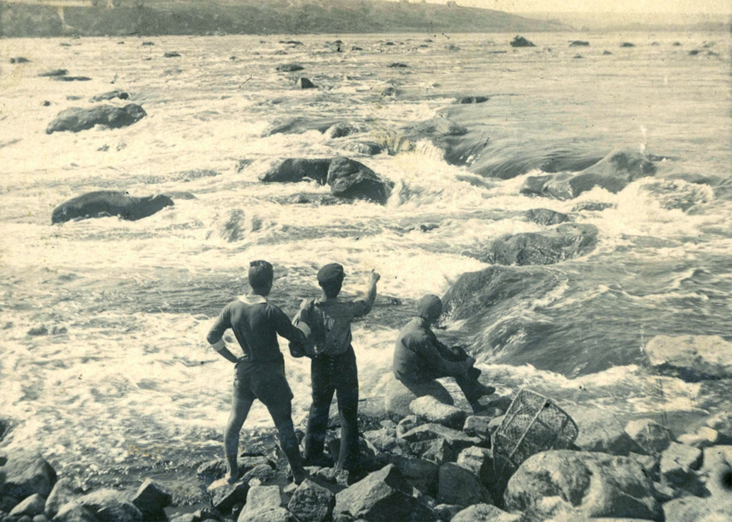 Дніпрові пороги.